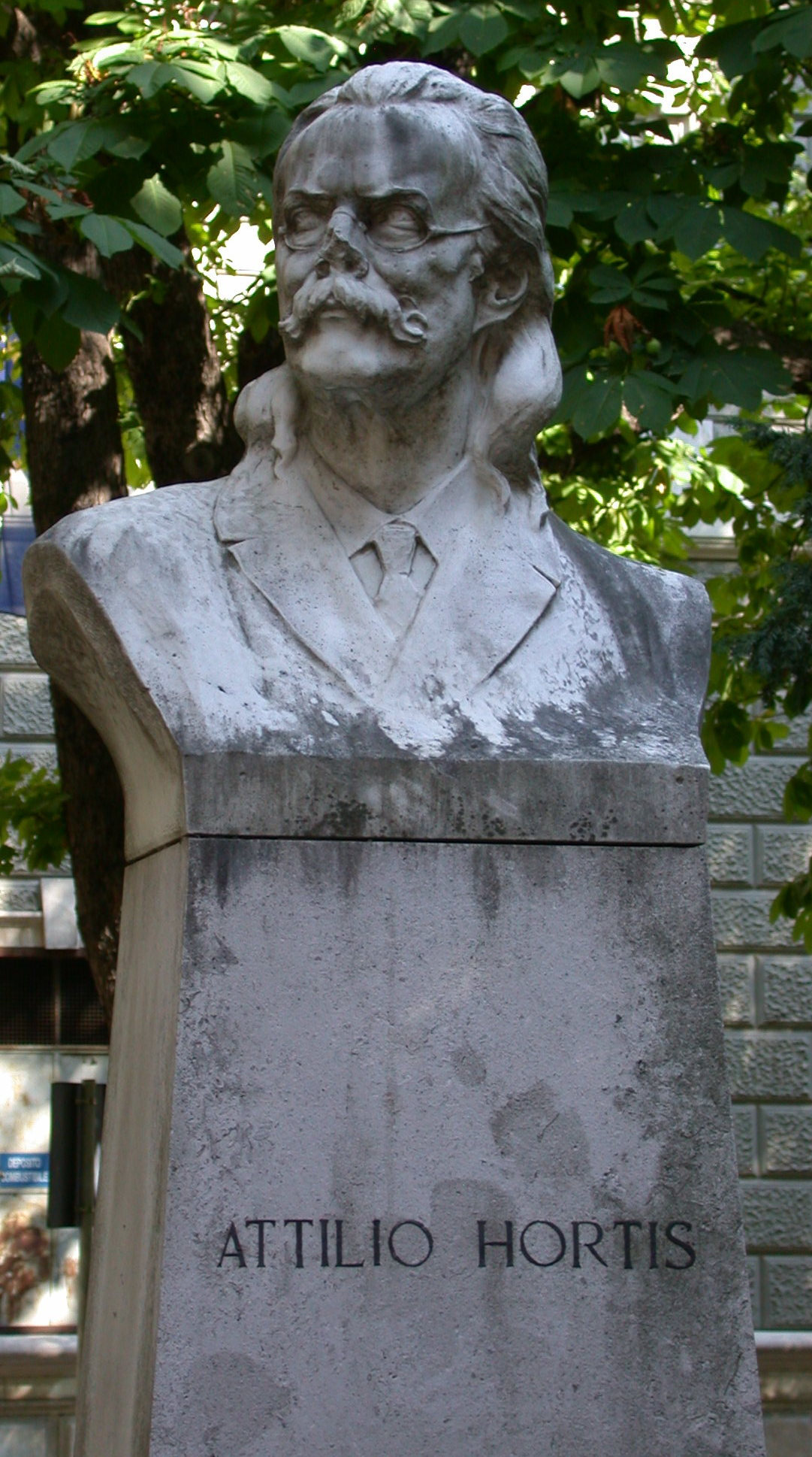 Monumento per Attilio Hortis a Trieste